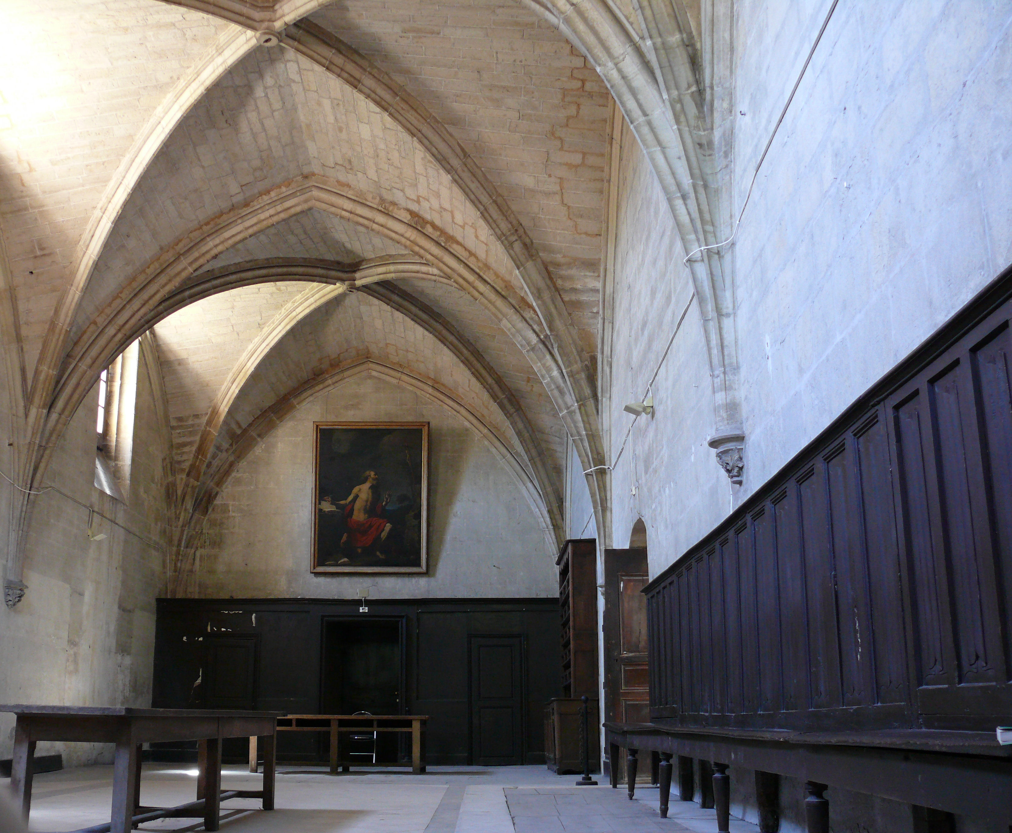 Villefranche-de-Rouergue - Chartreuse Saint-Sauveur - Réfectoire